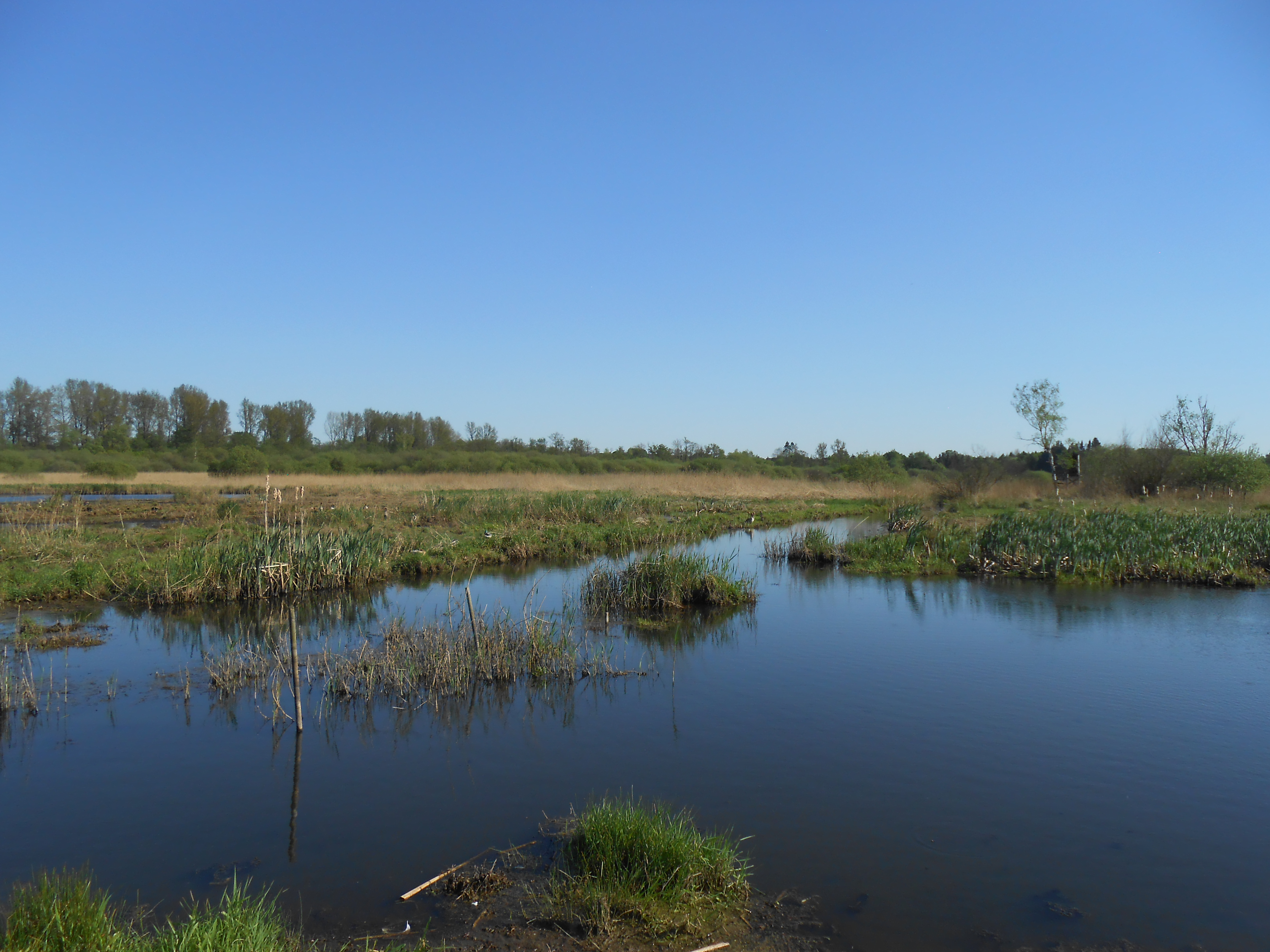 Der Blick vom Weg auf die Traveniederung.